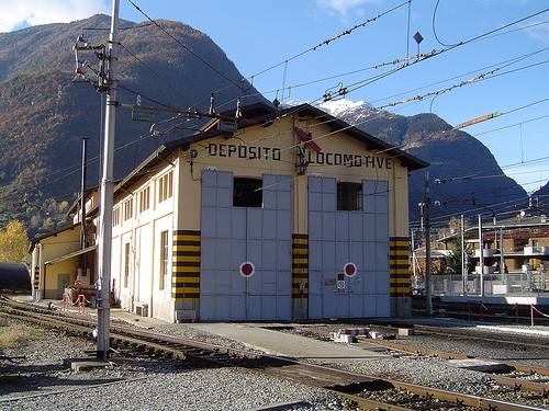 Il deposito locomotive di Tirano completamente restaurato